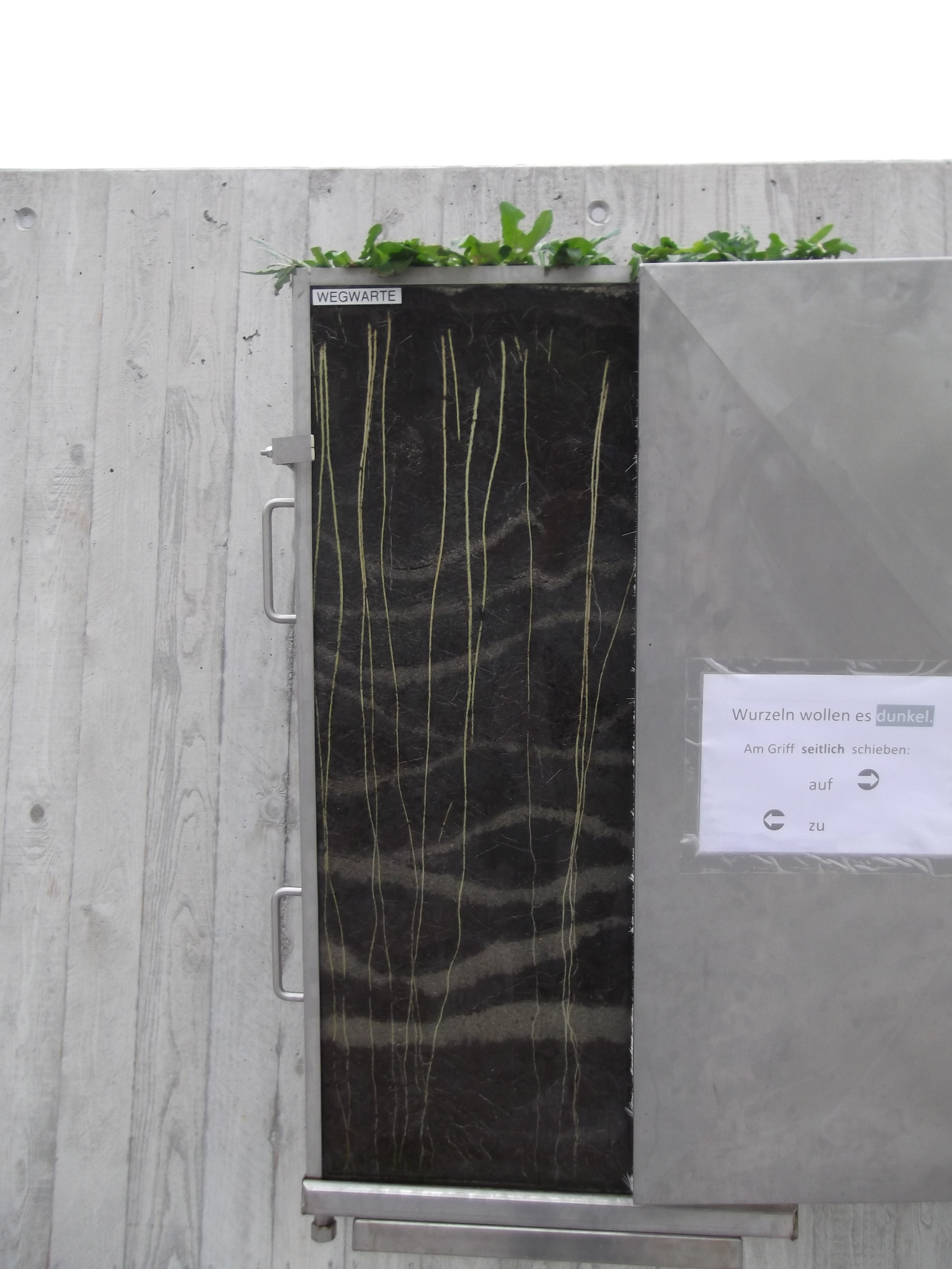 Wurzeln der Wegwarte (Gemeine Wegwarte; lateinischer Name: Cichorium intybus) in einem Schaukasten. Aufgenommen auf der Landesgartenschau Schwäbisch Gmünd (Baden-Württemberg) im Mai 2014.